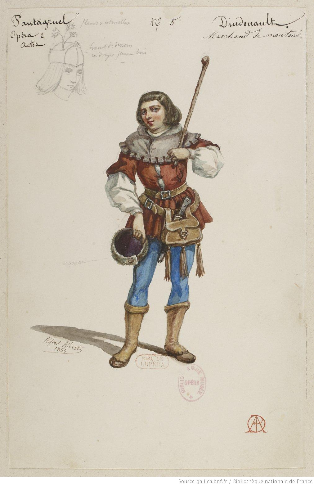 Maquette de costume pour un opéra bouffe- crayon, aquarelle, gouache ; H. ca 240 x L. 155 mmFait partie d'un ensemble de 8 planches conservées à la Bibliothèque nationale de France, département Bibliothèque-musée de l'opéra, D216-18 (15-22).